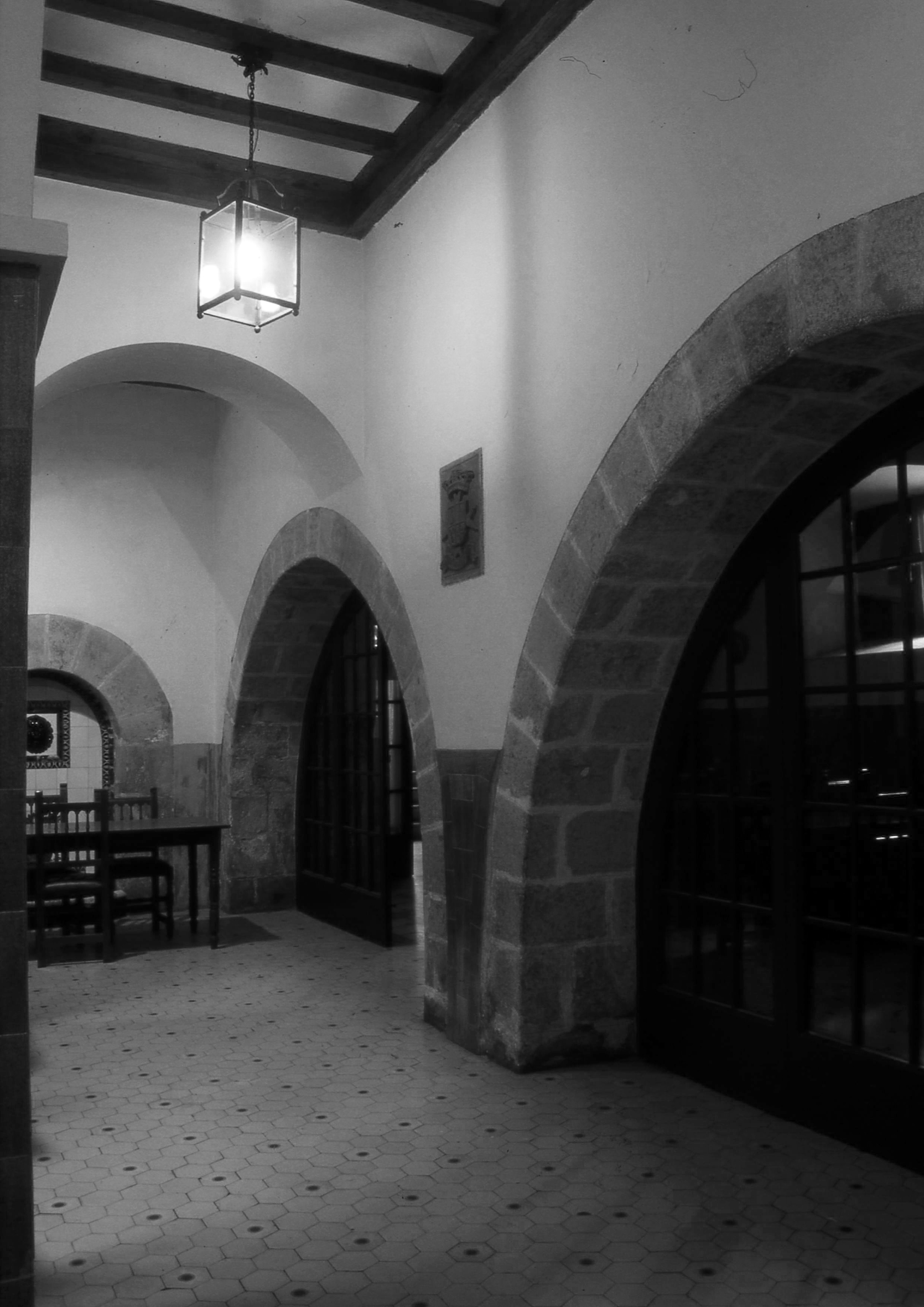 Barcelona, Torre de Sant Joan del Clot de la Mel. Antic pati interior de la torre reconvertit en menjador de l'escola. 2005.